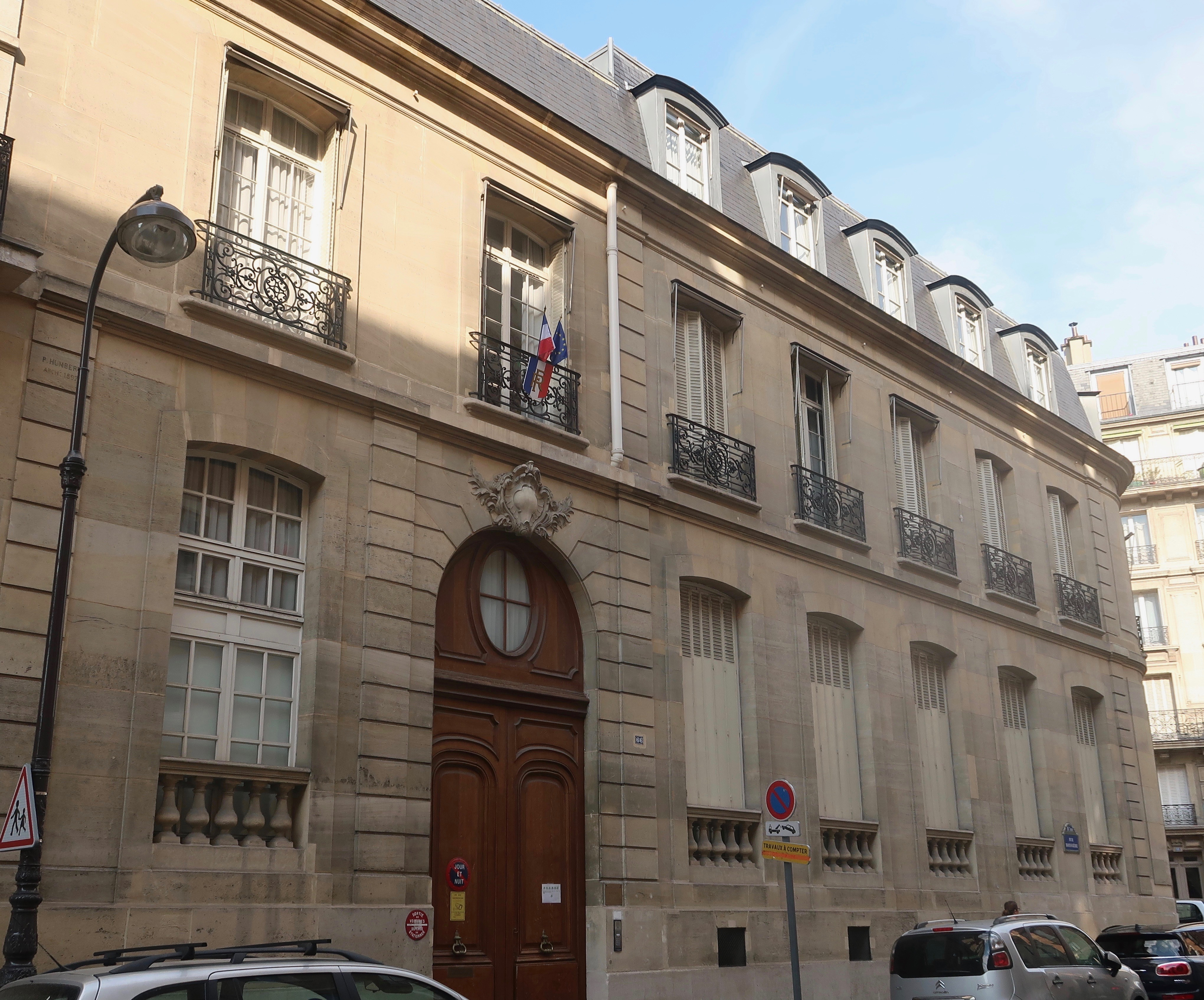 Caisse nationale militaire de sécurité sociale, 66 rue Boissière (Paris, 16e).